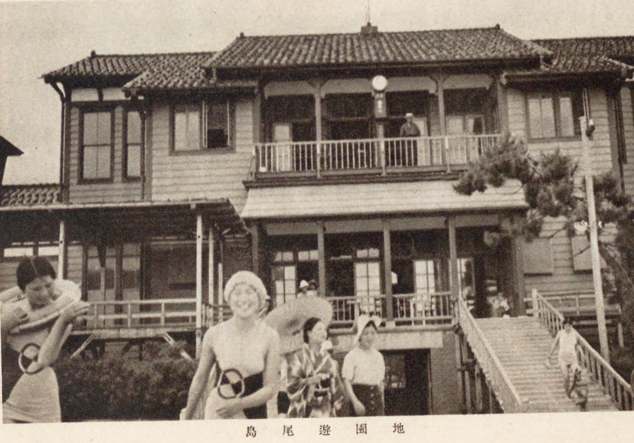 島尾海水浴場の戦前の姿。